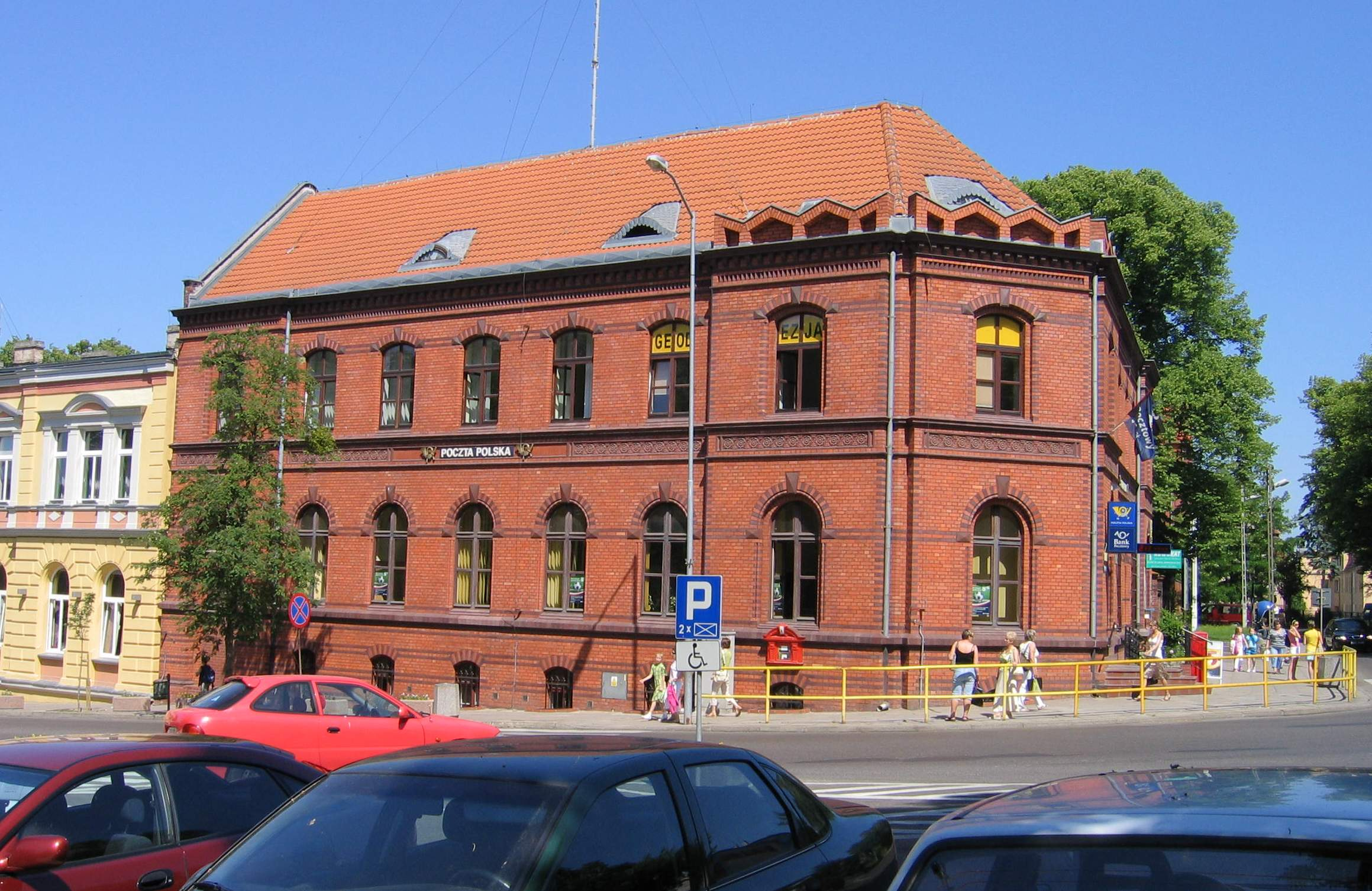 poczta Gryfino, ul. Sprzymierzonych 2